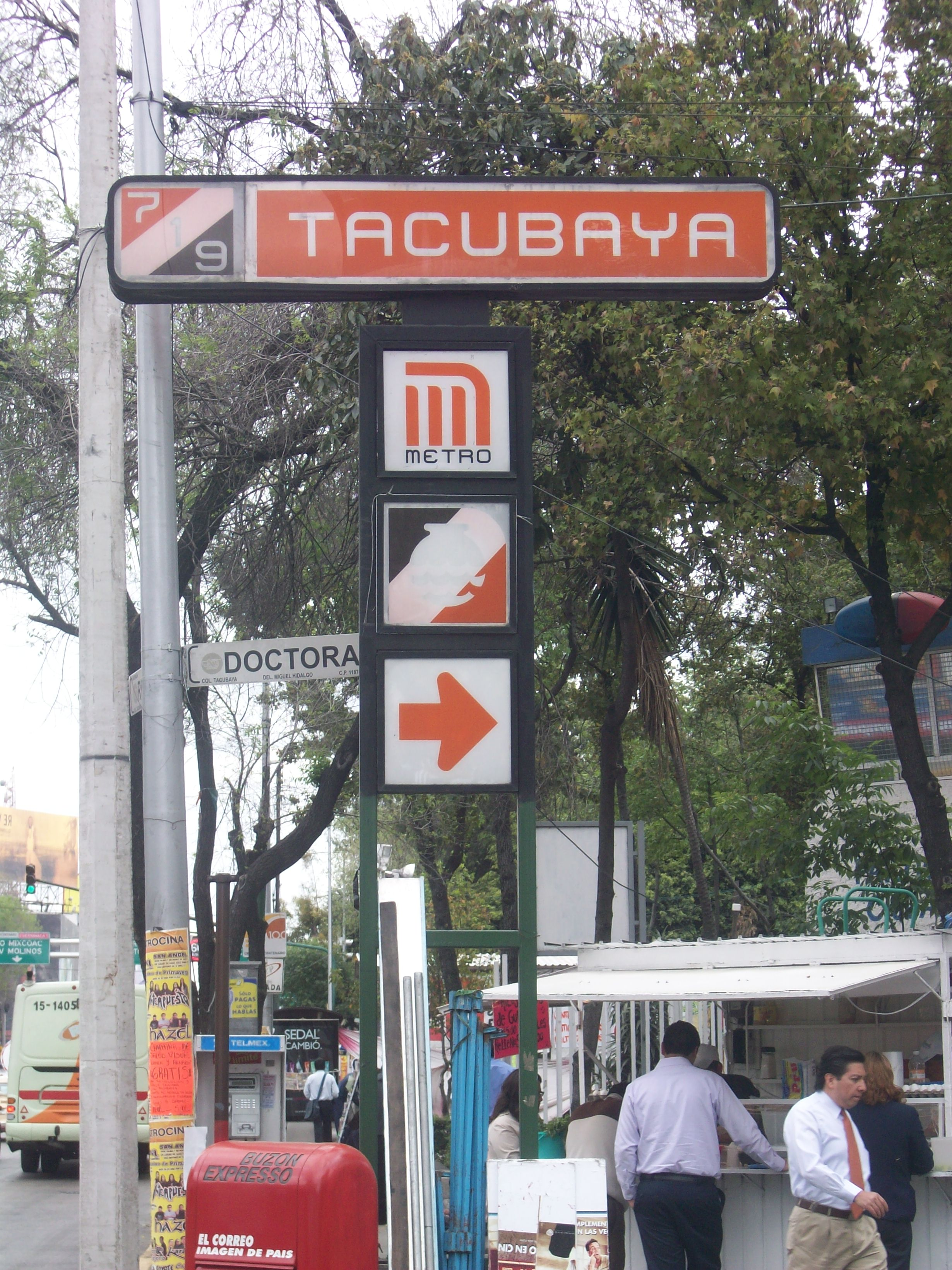 Letrero del Metro Tacubaya